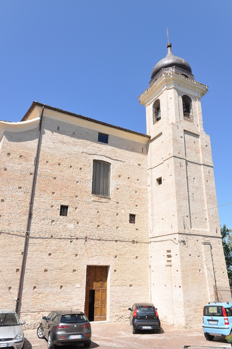 Penne (comune, Italy) 2012